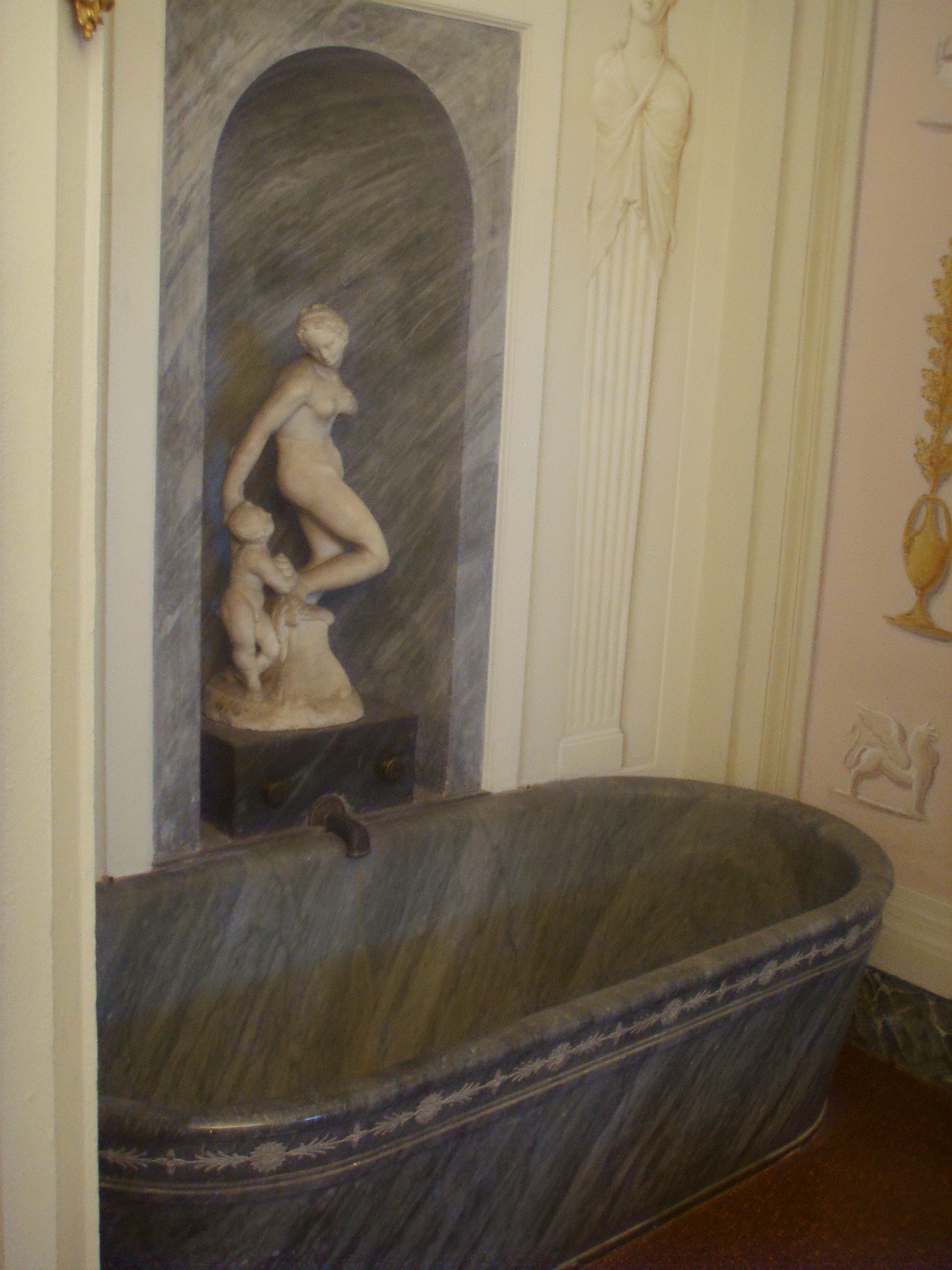 Villa medicea di Poggio a Caiano, inside toilet room in Poggio a Caiano, Italy